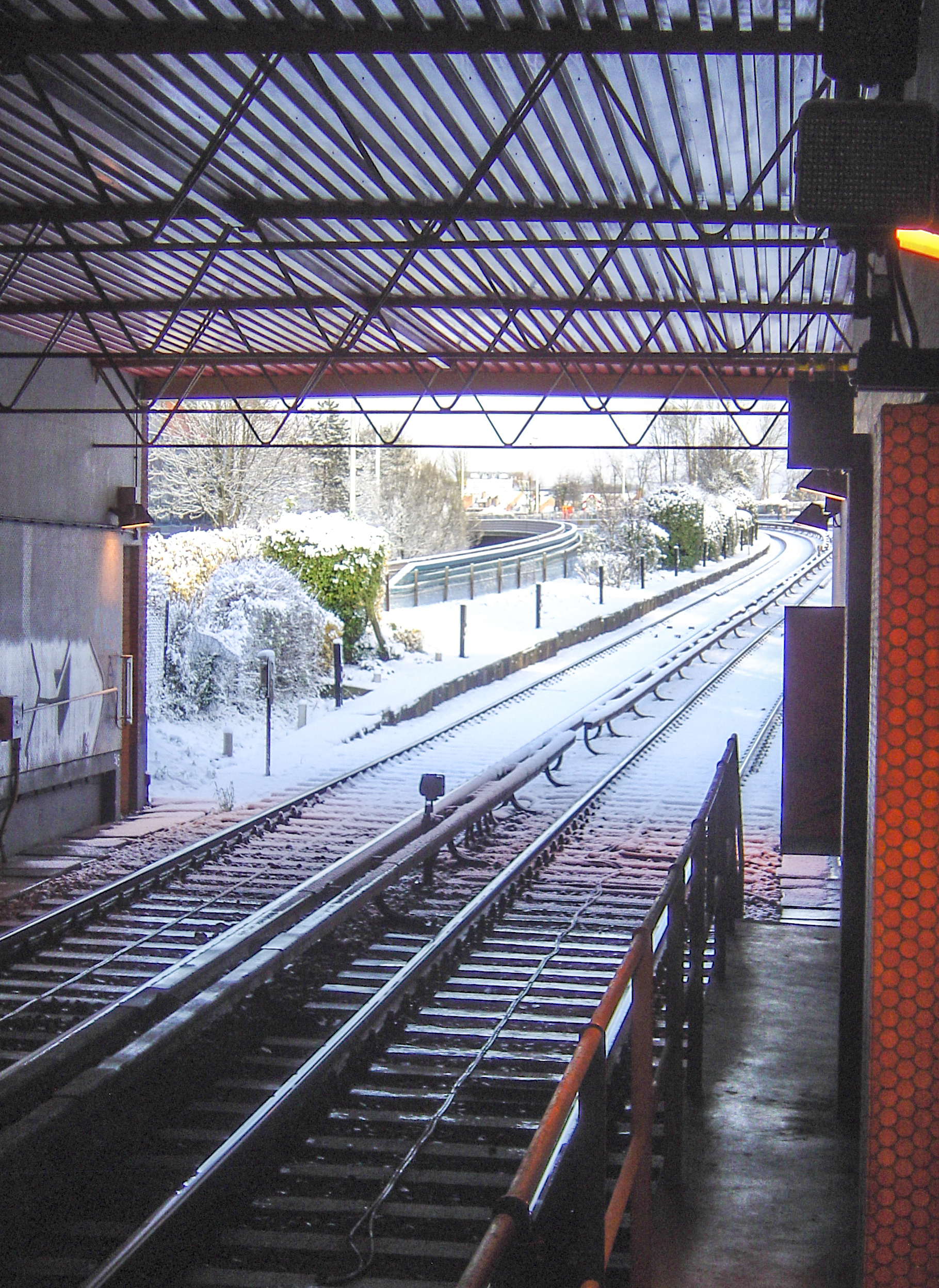 Hankar metro station